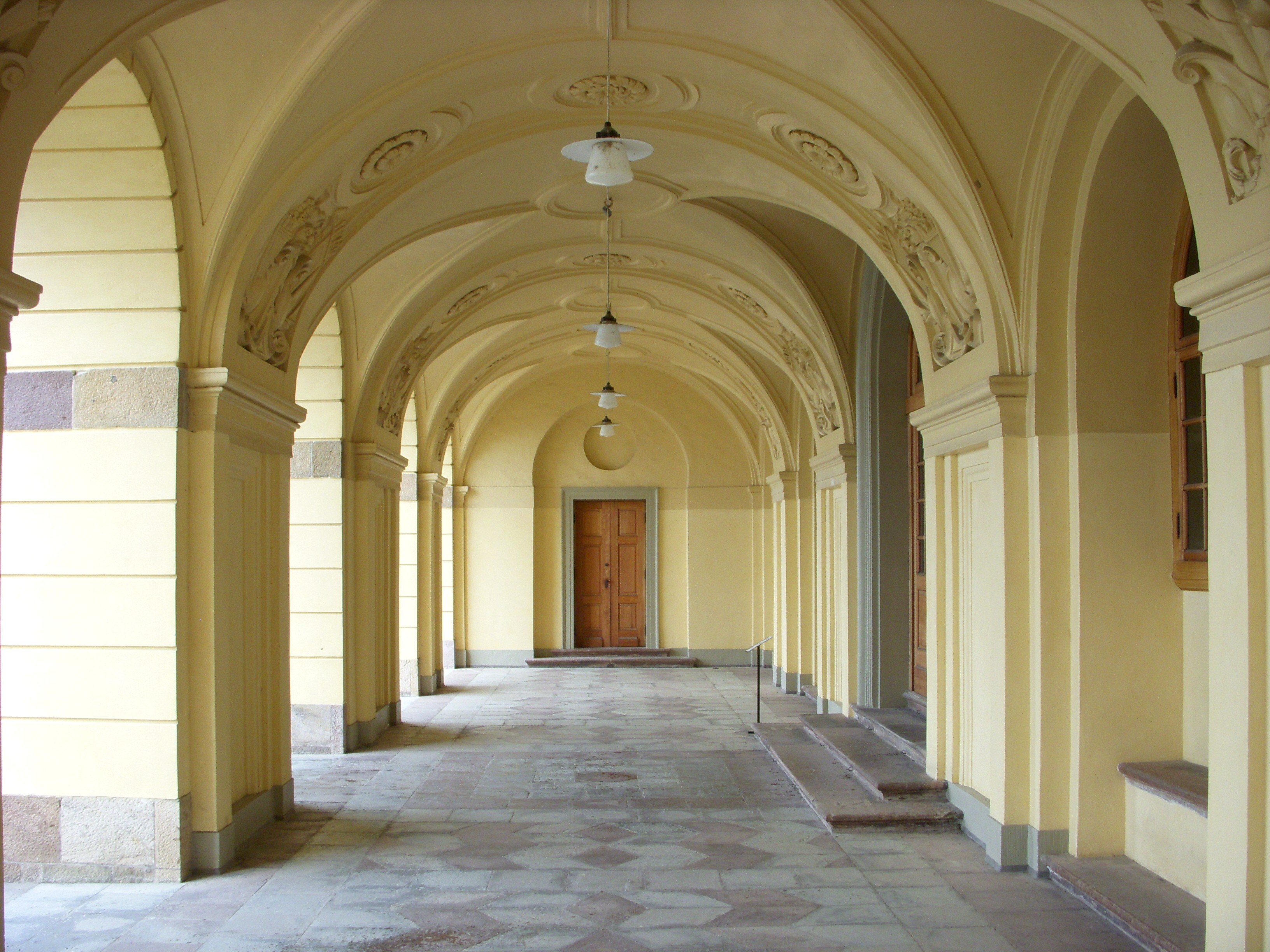 Drottningholms slott, östsidan, entrevalvet